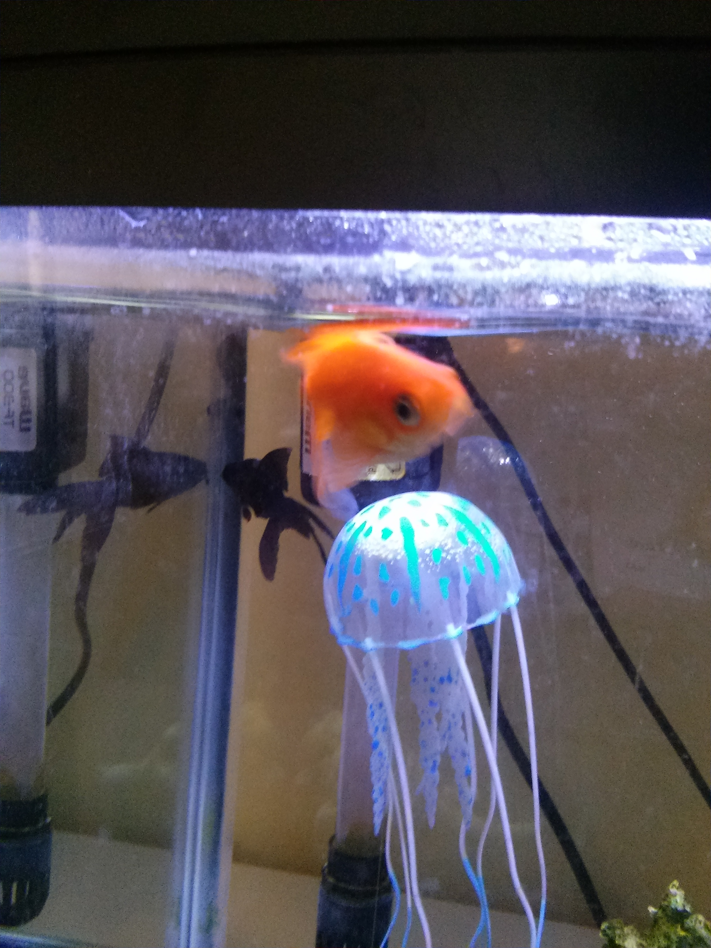 Porzione di acquario. Da notare la medusa di plastica, forma di arredo di acquario.